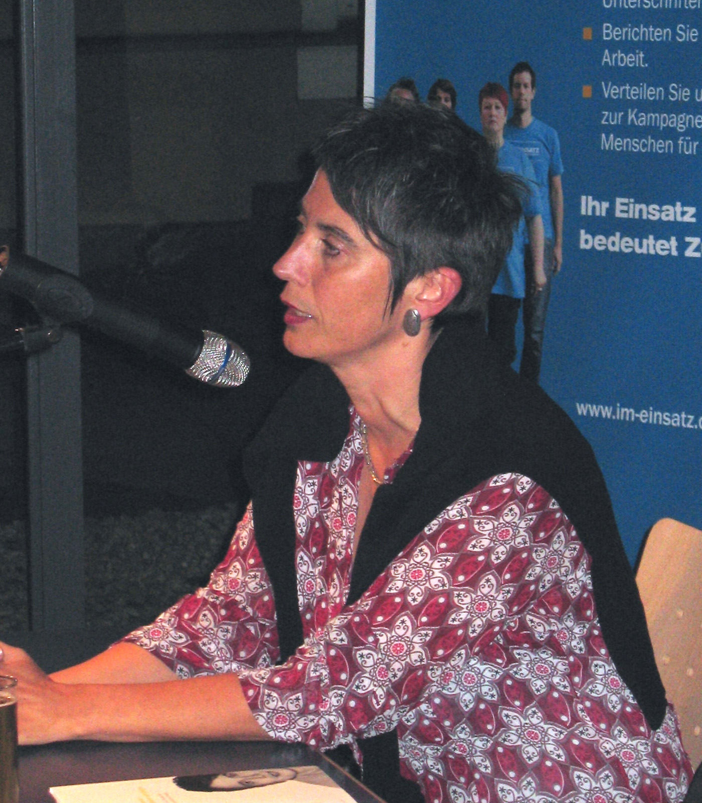 Die Gynäkologin und Alternative Nobelpreisträgerin Monika Hauser bei einer Lesung Edited by Micha L. Rieser: brightness, contrast, color corrections, crop